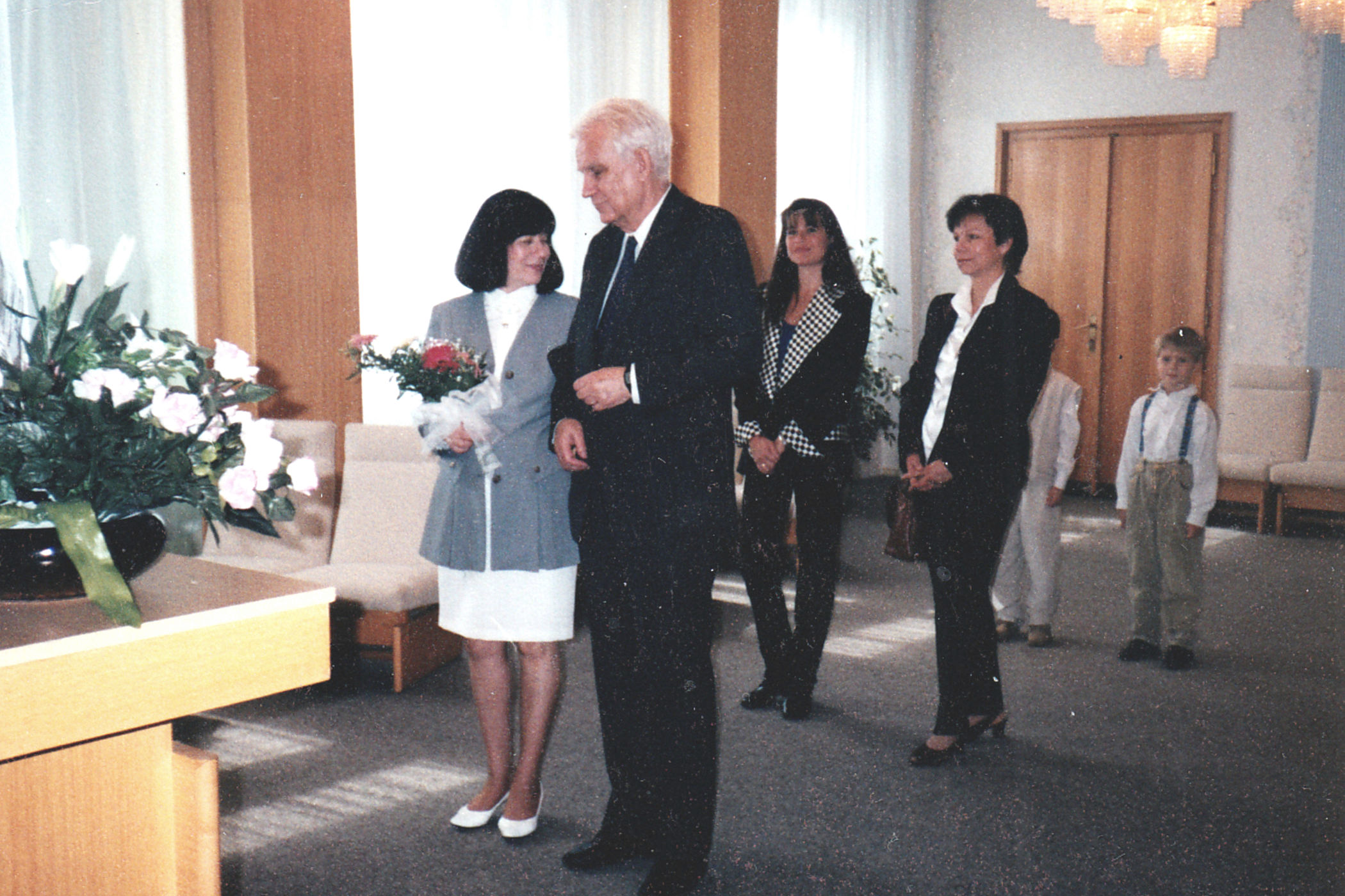 Inna Mirovská a Jan Rott, svatba 1998, za nimi dcera Inny a dcera Jana, za nimi vnoučata